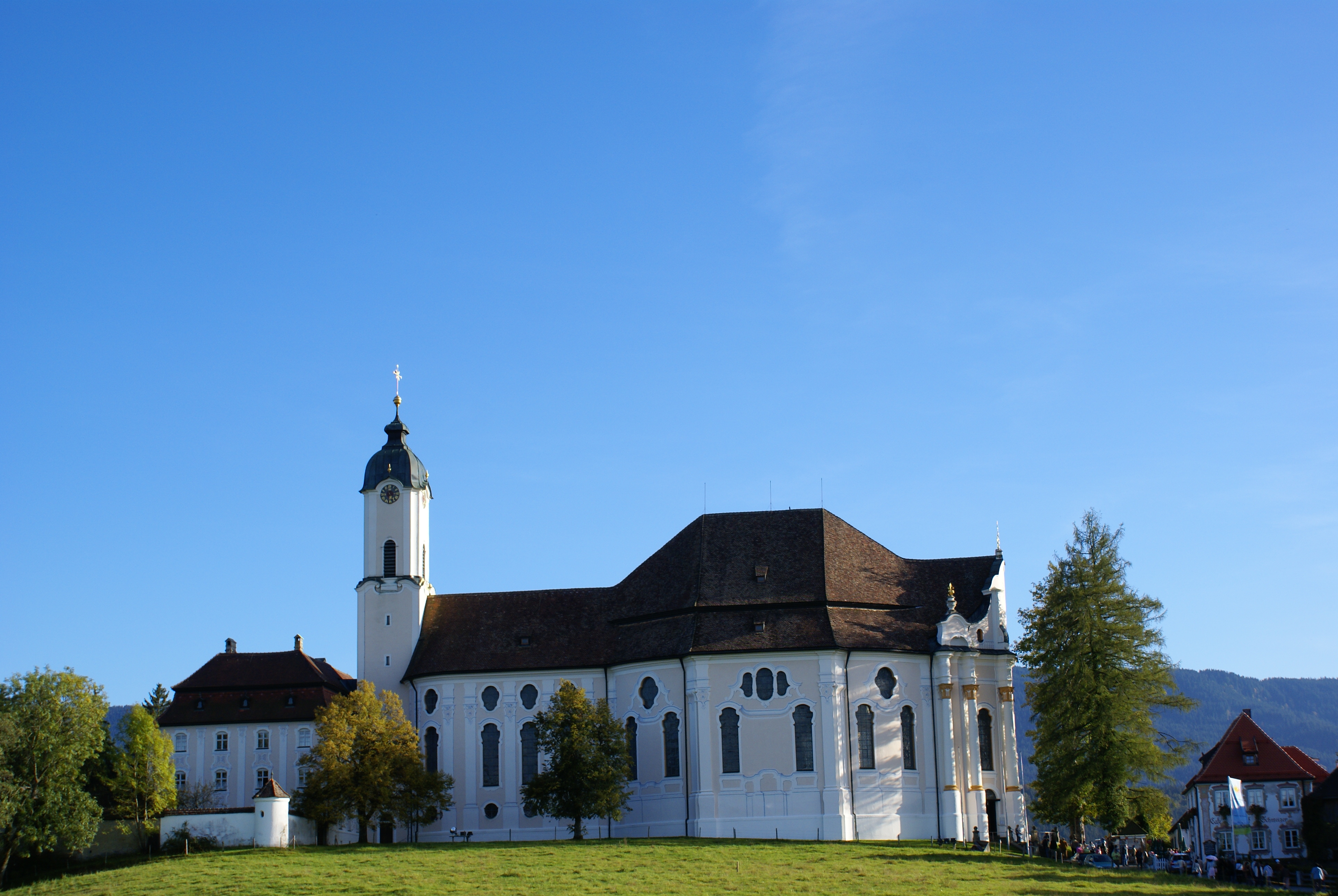 Wieskirche